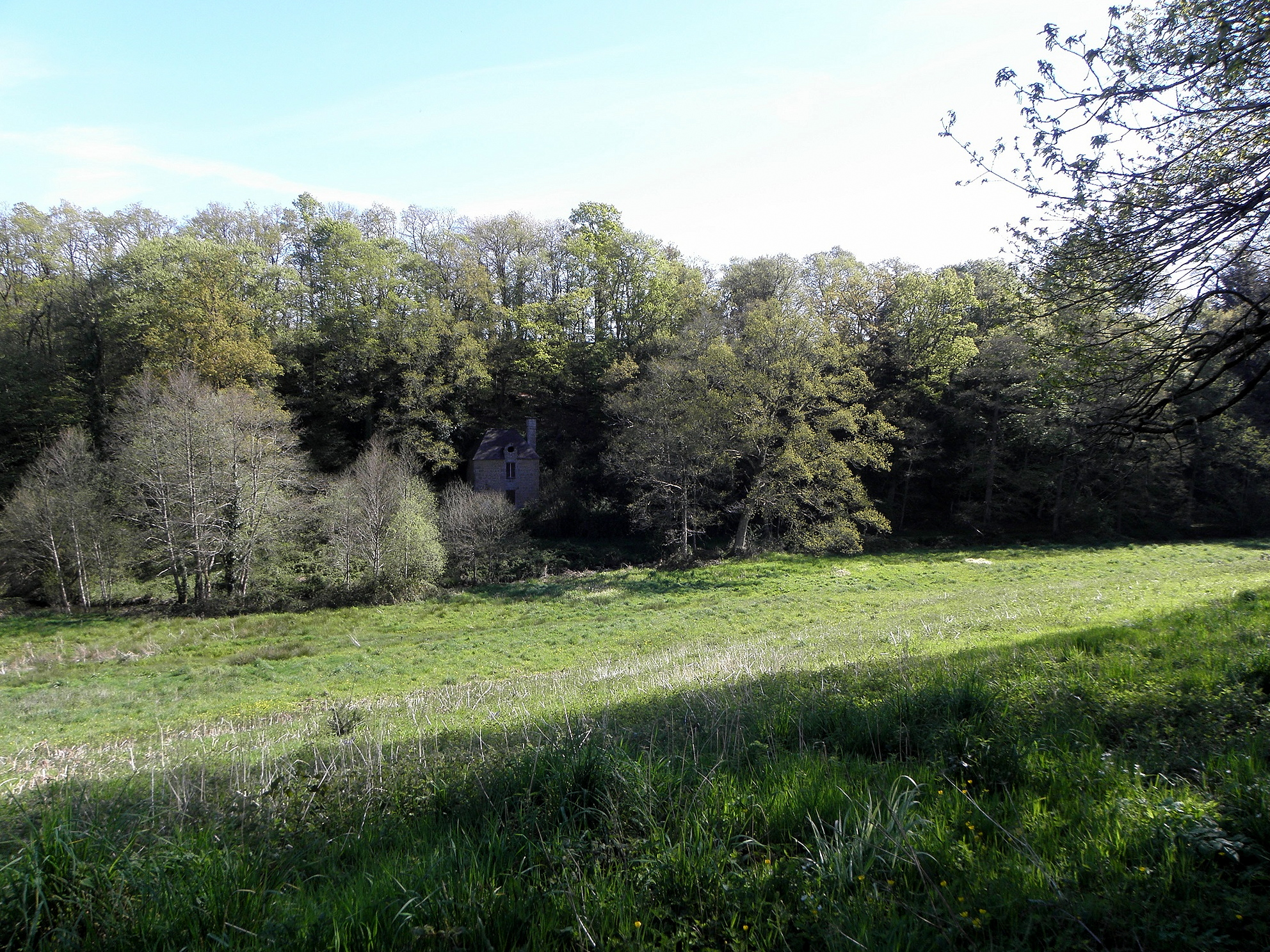 Maison de Malagra, commune de La Bazouge-du-Désert (35). Lieu d'arrestation d'Antoine-Philippe de La Trémoïlle, Prince de Talmont en 1793.